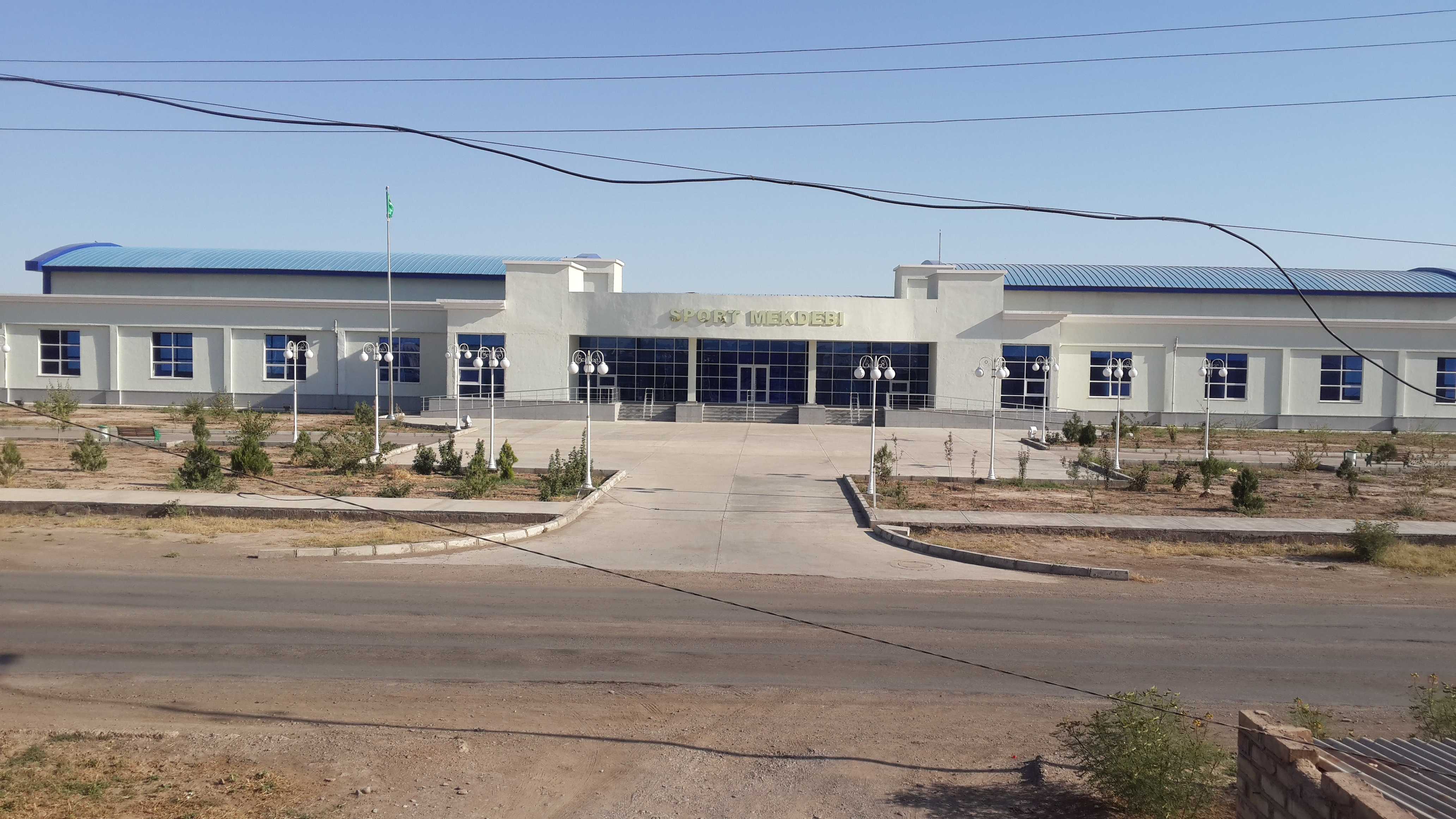 By Eziz Yazgeldiyev